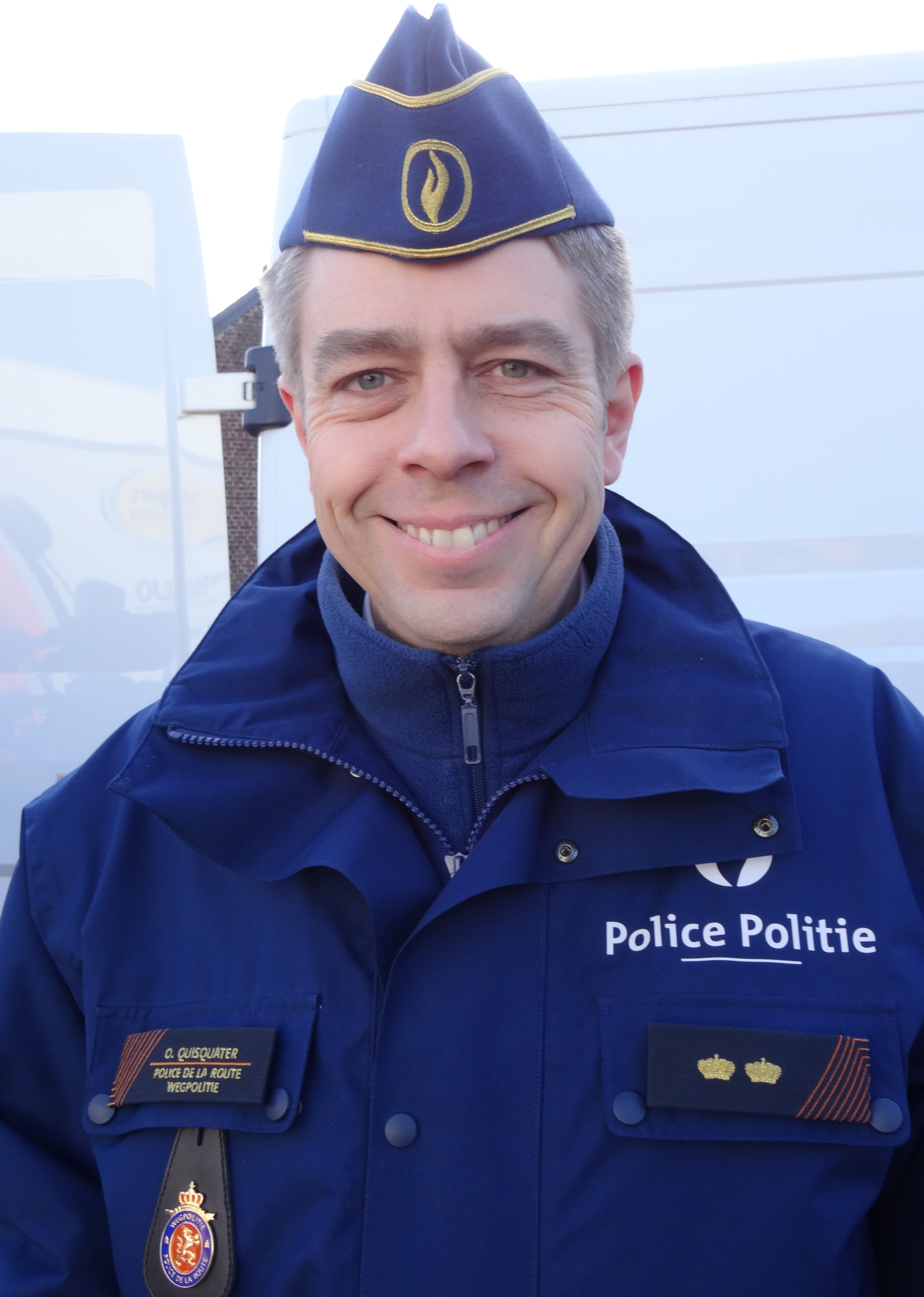 Reportage réalisé le mercredi 4 mars à l'occasion du départ du Samyn des Dames 2015 et du Samyn 2015 à Quaregnon, Belgique.